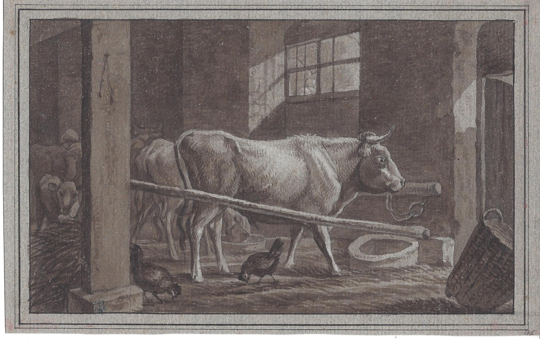 Kuhstall mit einer Reihe von Rindern, wobei einige Hühner. Ausgeführte Zeichnung von Samuel Gränicher, mit Sepie und Weiss gehöht. Provenienz: Sammlung Carl Rolas du Rosey, Katalognummer 5212, Versteigerungskatalog der Sammlung du Rosey vom 5. September 1864. (Die Kupferstiche, Handzeichnungen und Kunstbibliothek, nachgel. Durch... Carl Rolas du Rosey, deren 2te Hälfte... 5. Sept. 1864 und folgende Tage versteigert wird)